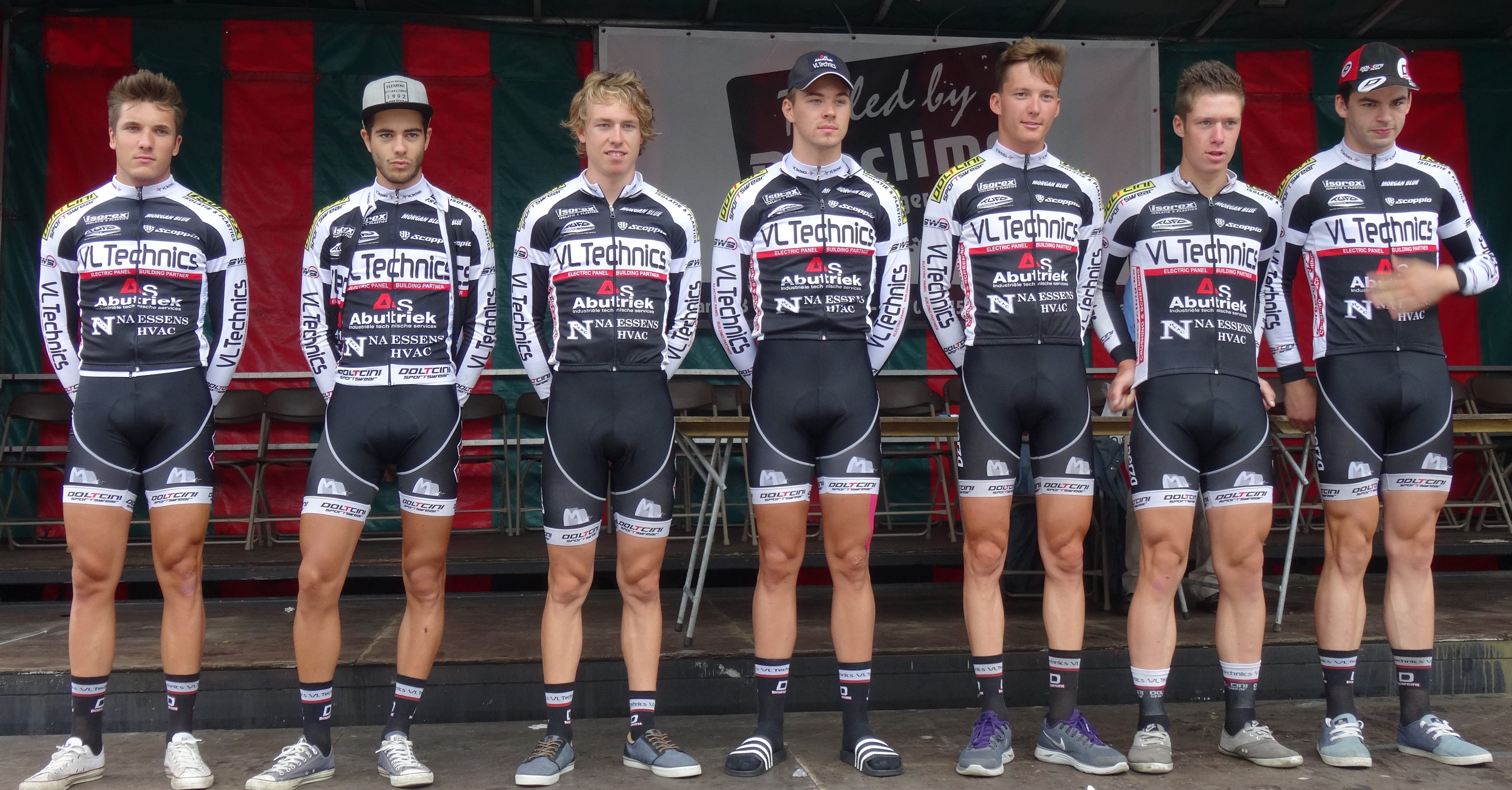 Reportage photographique réalisé le dimanche 10 août à l'occasion du départ et de l'arrivée de la Flèche du port d'Anvers 2014 à Merksem (Anvers), Belgique.